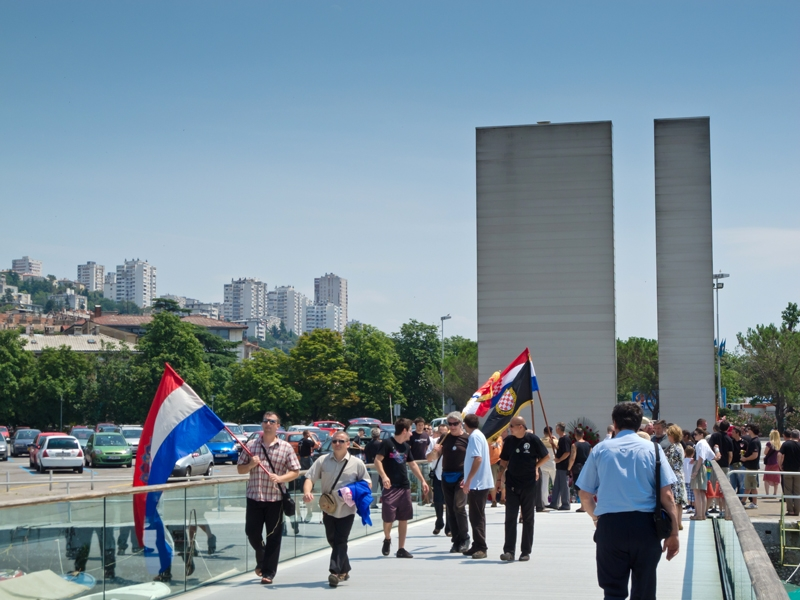 Povorka hrvatskog ponosa i slave; Dan državnosti u Rijeci, Most hrvatskih branitelja iz Domovinskog rata